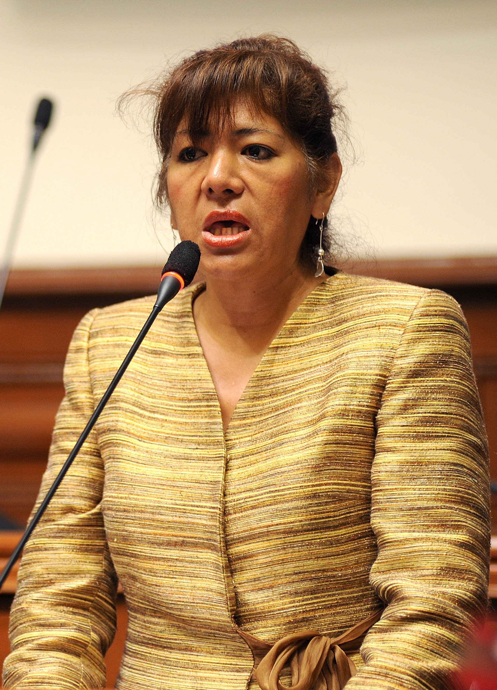 La legisladora Martha Acosta fija su posición en el debate parlamentario realizado esta tarde por el Pleno.